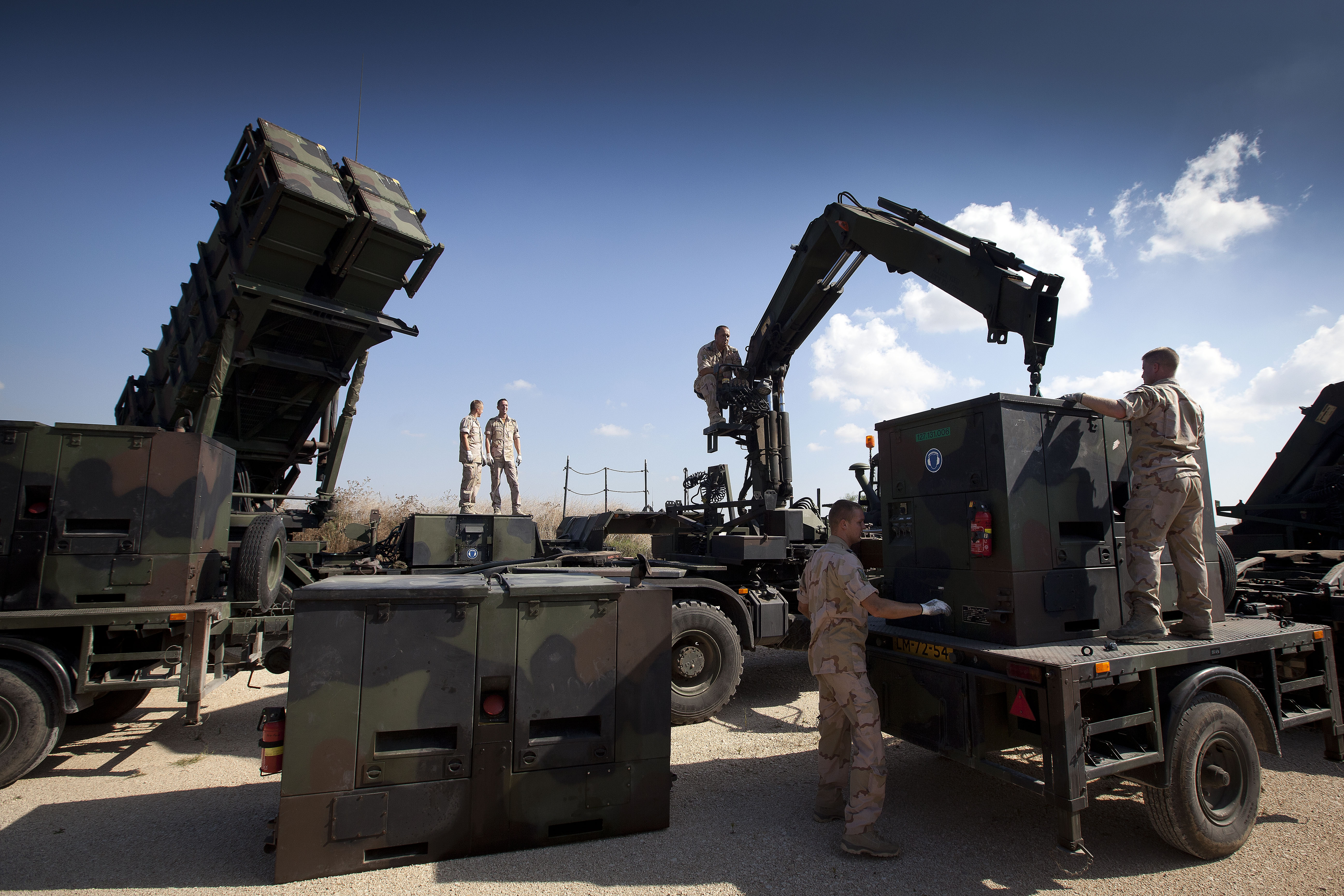 Turkije, Adana, Incirlik airbase, 26 september 2013. Lucht-en landmachtpersoneel van het Defensie Grondgebonden Luchtverdedigings Commando (DGLC) participeert in de patriotmissie 'Active Fence' ter bescherming van het zuiden van Turkije. 1 (NL) TBMTF beschermt de stad Adana.